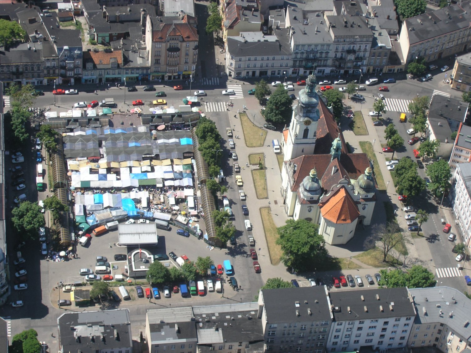 Kościół Najświętszego Serca Jezusa w Bydgoszczy lotnicze